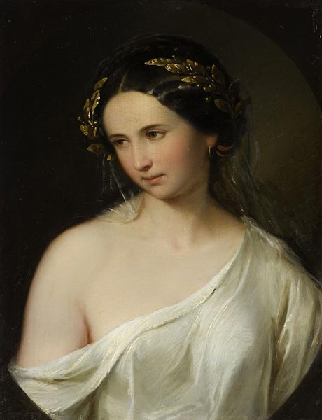 Portraitlabel QS:Len,"portrait"label QS:Lde,"Bildnis einer bekränzten Frau"